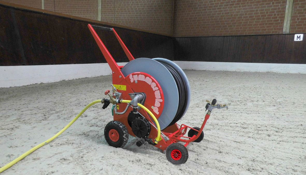 mobile Beregnungsanlage, Reithallenberegnung, Reitplatberegnung, Summerwind